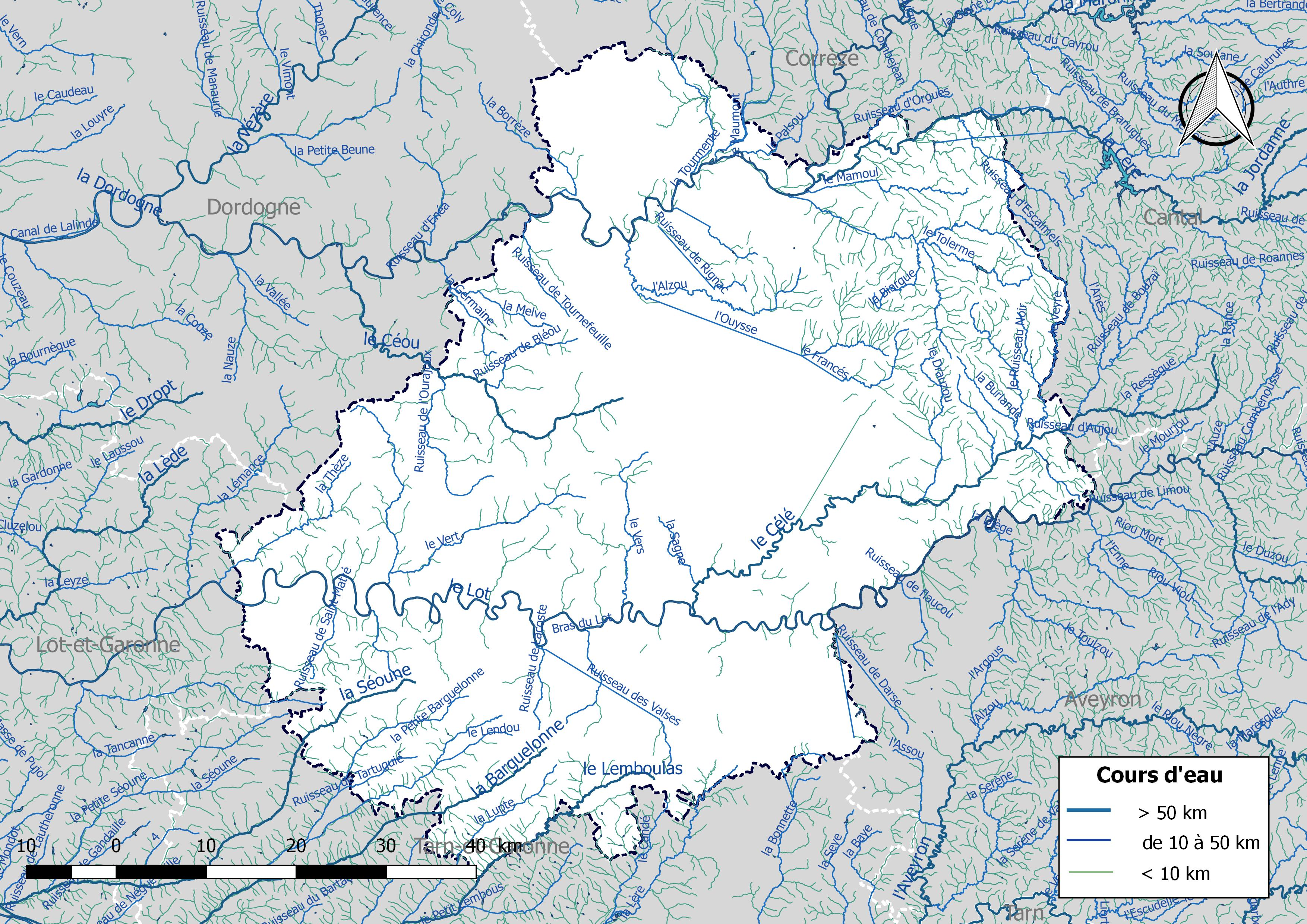 Réseau hydrographique du département du Lot (France).